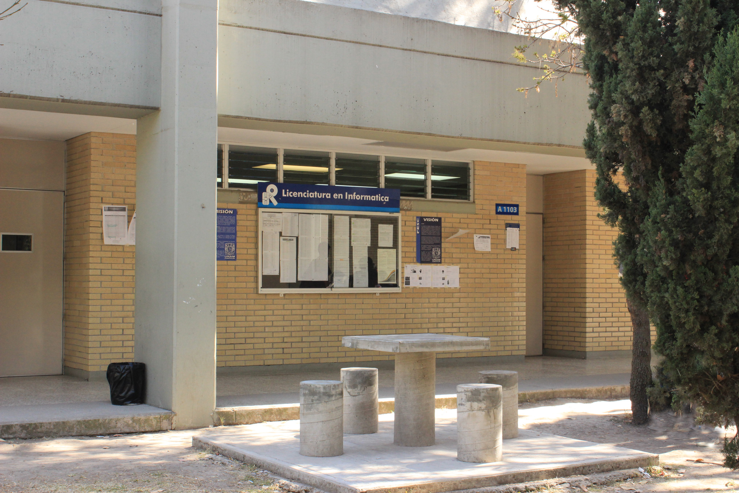 Edificio de Informática